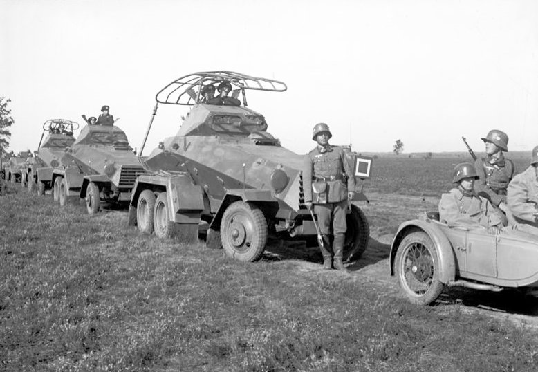 Manöver des VI. Armeekorps in der Lüneburger Heide vom 2. bis 7. September 1935, Panzerspähwagen Information added by Wikimedia users.Spähpanzer: Im Vordergrund Pz-Spw. (6 Rad) (Fu) (Sd.Kfz. 232), dahinter Pz.Spw. (6 Rad) (Sd.Kfz. 231).